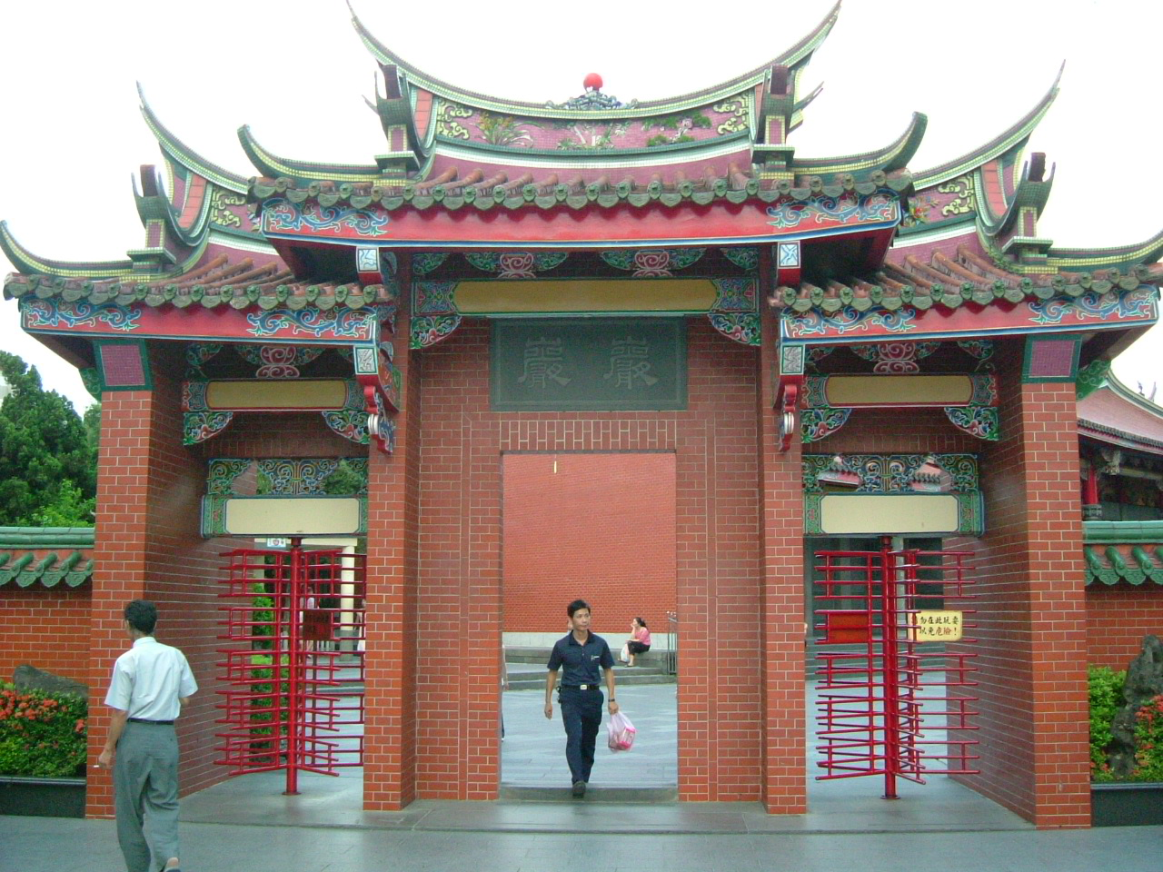 臺北市行天宮正門。